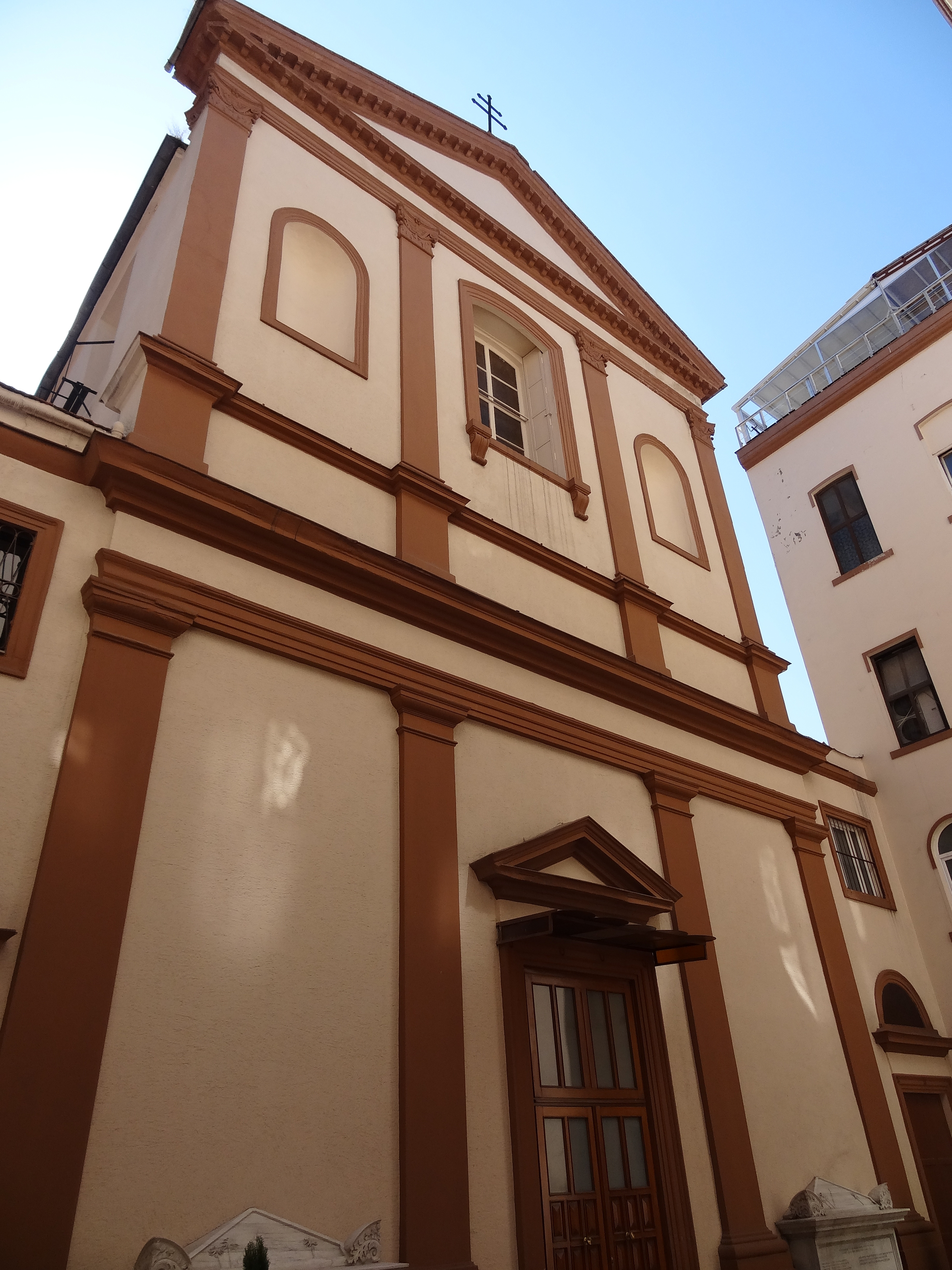 Fassade der armenisch-katholischen Kathedrale in Istanbul